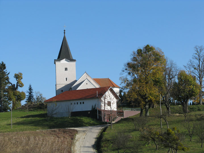 Crkva u Zajezdi. općina Budinščina, Krapinsko-zagorska županija